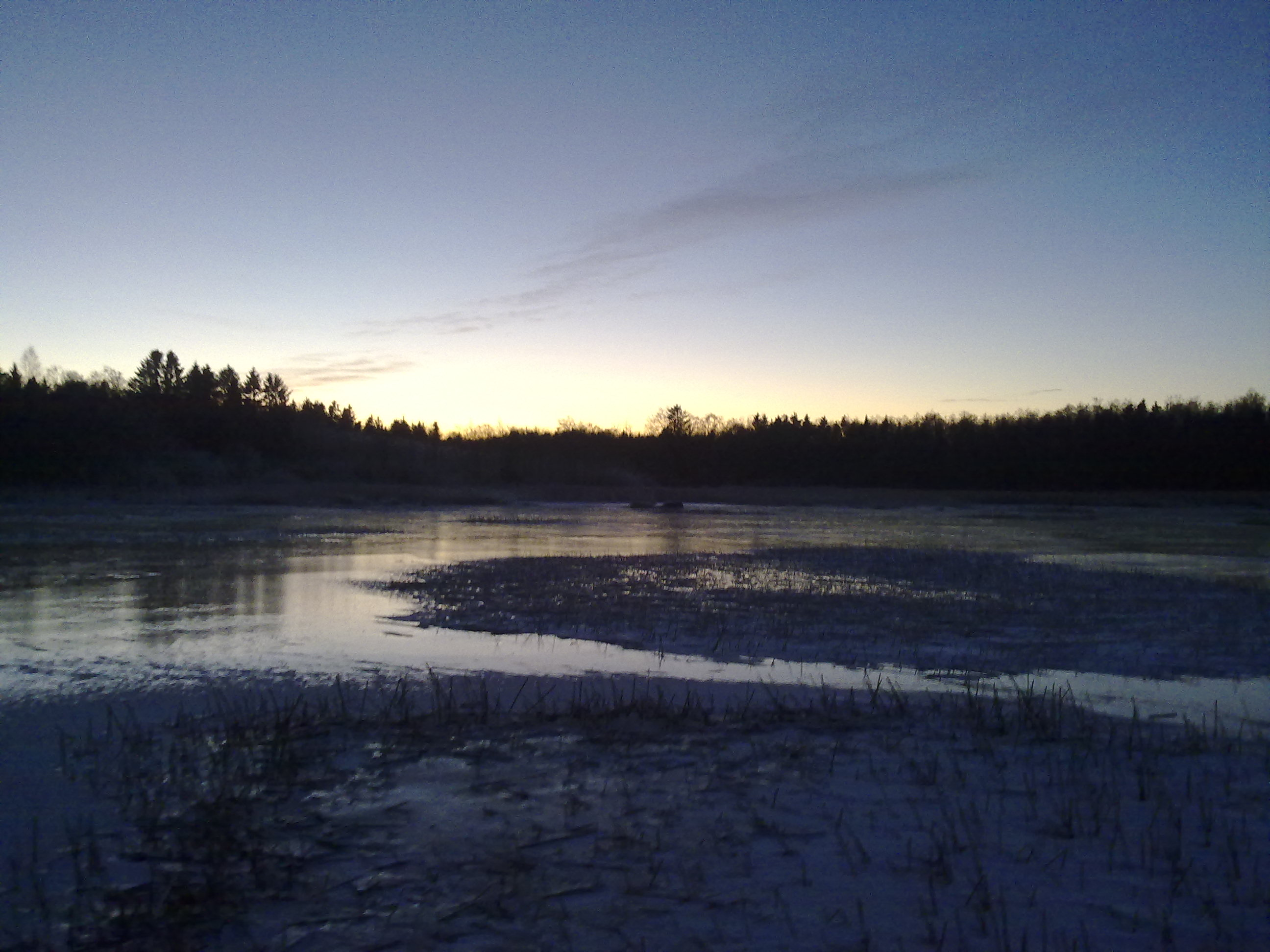 Jäätynyttä Kokemäenjoen suiston rantaa Metsämaan Kunnanrannan ja Pihlavan Halssin välillä.